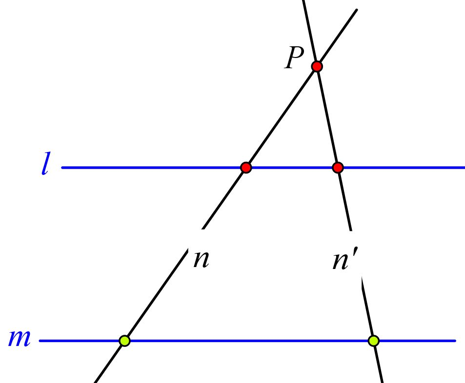 incidentiemeetkude, trapeziumaxioma (affien)